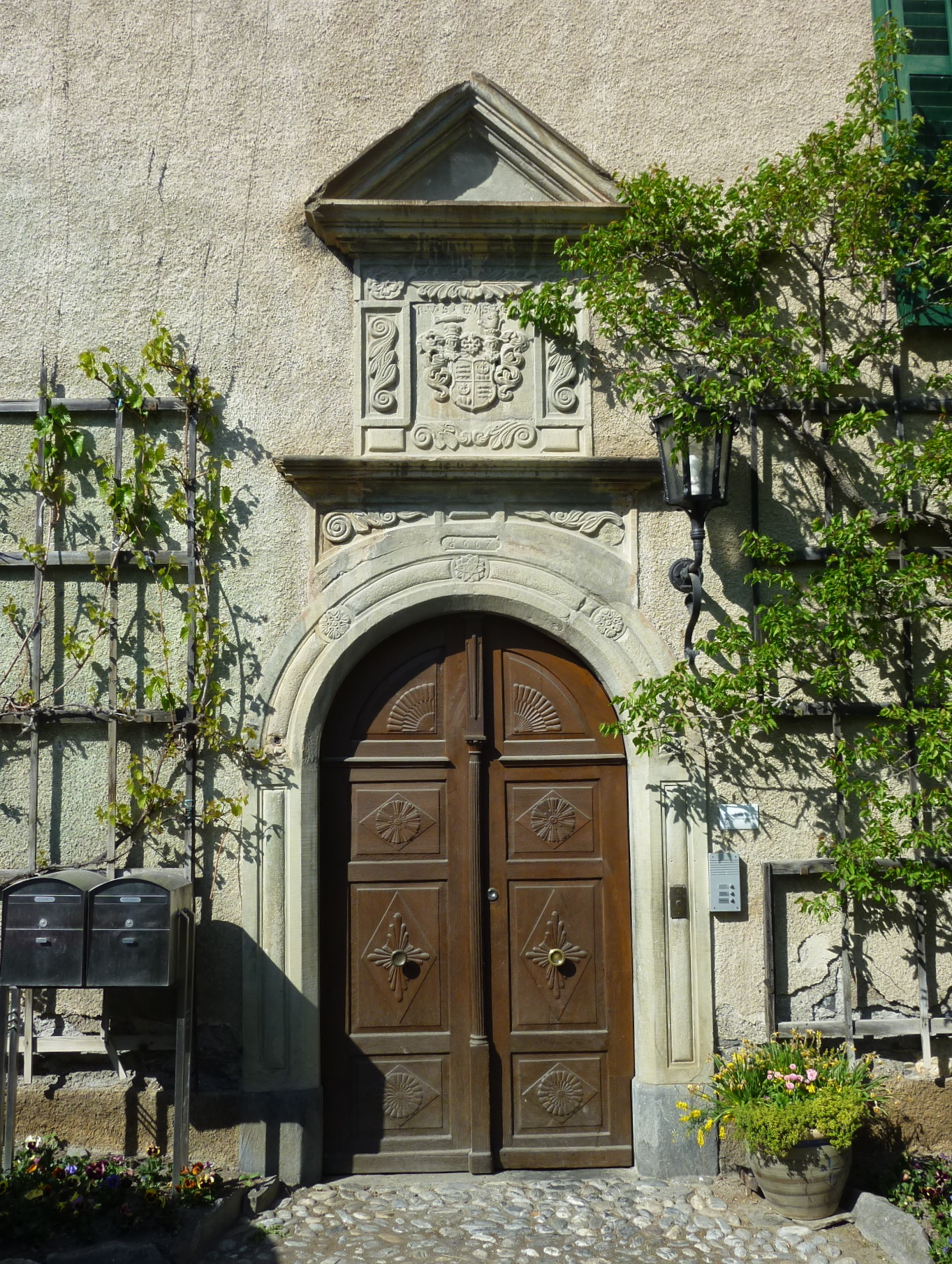 Schloss Schauenstein Portal mit Jahreszahl und Wappen